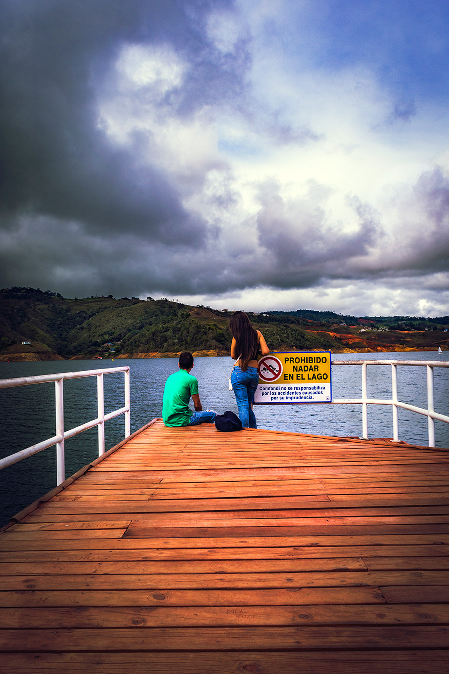 Esta fotografía fue tomada en el municipio colombiano con código 76126.